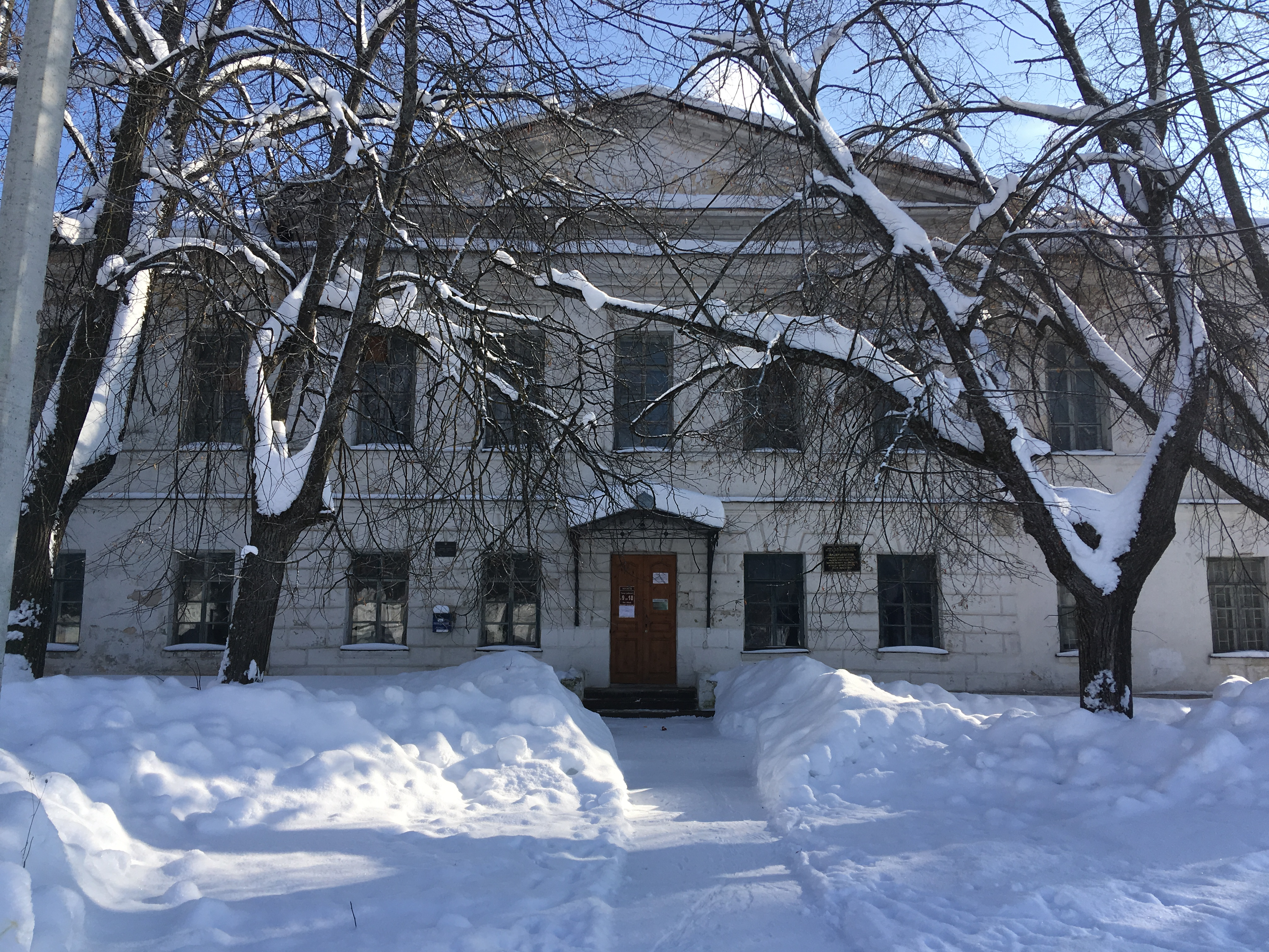 мкм